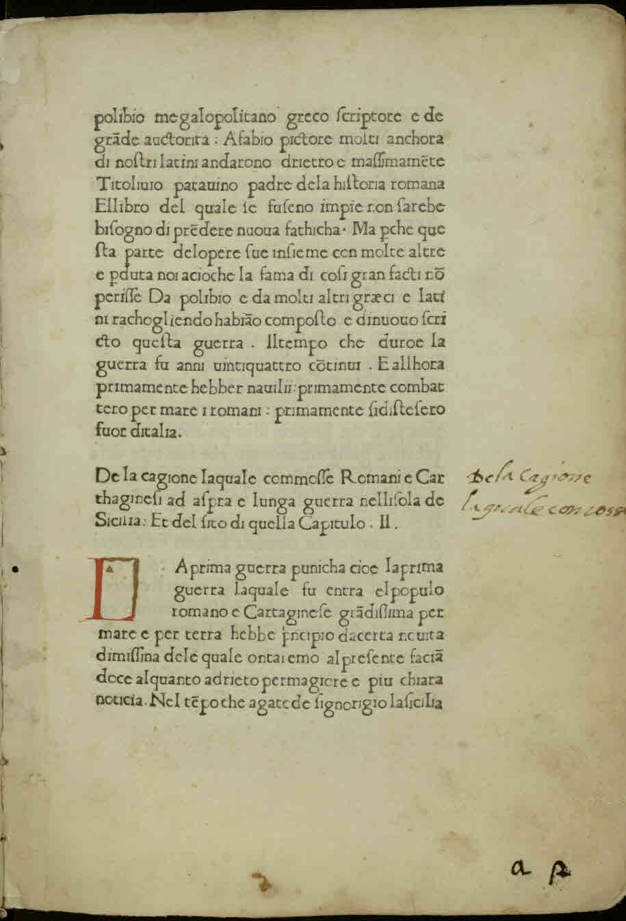 De primo bello punico (italiano). - [Venezia] : [Tipografo del Basilius], [circa 1471]. - 86 c. ; [a-g¹⁰, h-i⁸] ; 4º.